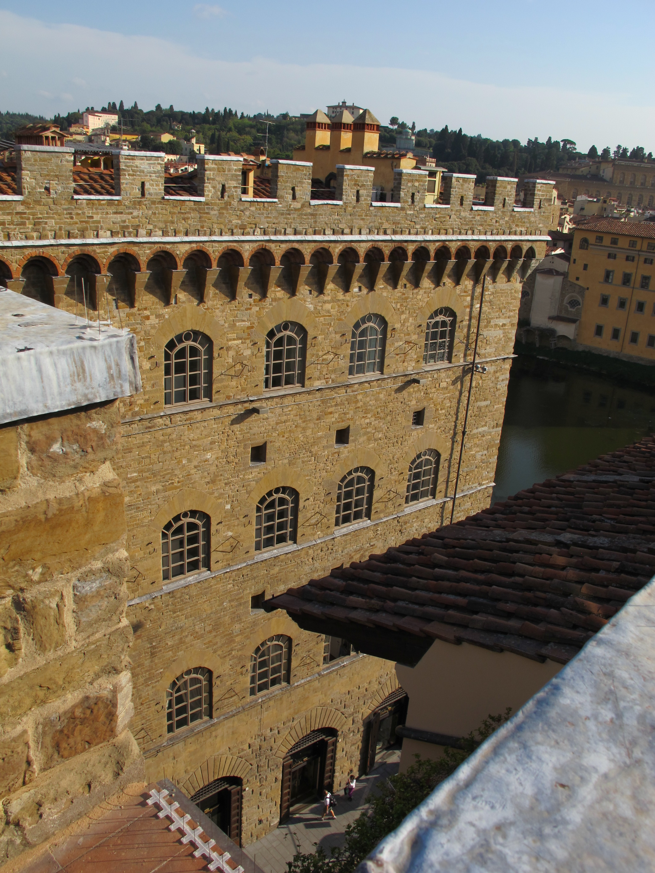 Hotel antica torre tornabuoni, terrazza, veduta palazzo spini feroni